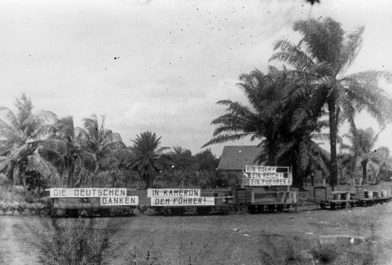 Title: Kamerun, Volksabstimmung Extra information: Kamerun.- Volksabstimmung zum ?Anschluss? Österreichs an das Deutsche Reich, Bananenwagen für den Transport von Deutschen Siedlern zum Wahllokal auf einem Bananendampfer in Tikko am Munkofluss Factual corrections and alternative descriptions are encouraged separately from the original description. Additionally errors can be reported at this page to inform the Bundesarchiv. Original historic description: 57.) Wahl 1938 in Kamerun